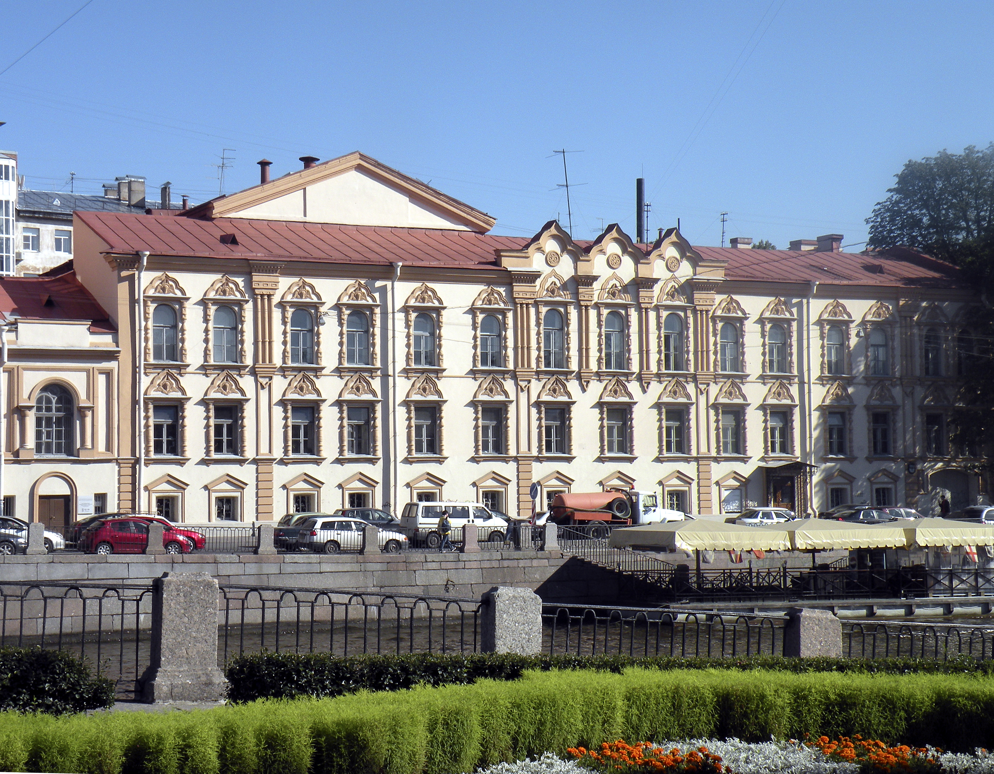 Здание бывшего подворья Троице-Сергиевой Лавры с бывшей церковью Преподобного Сергия Радонжского